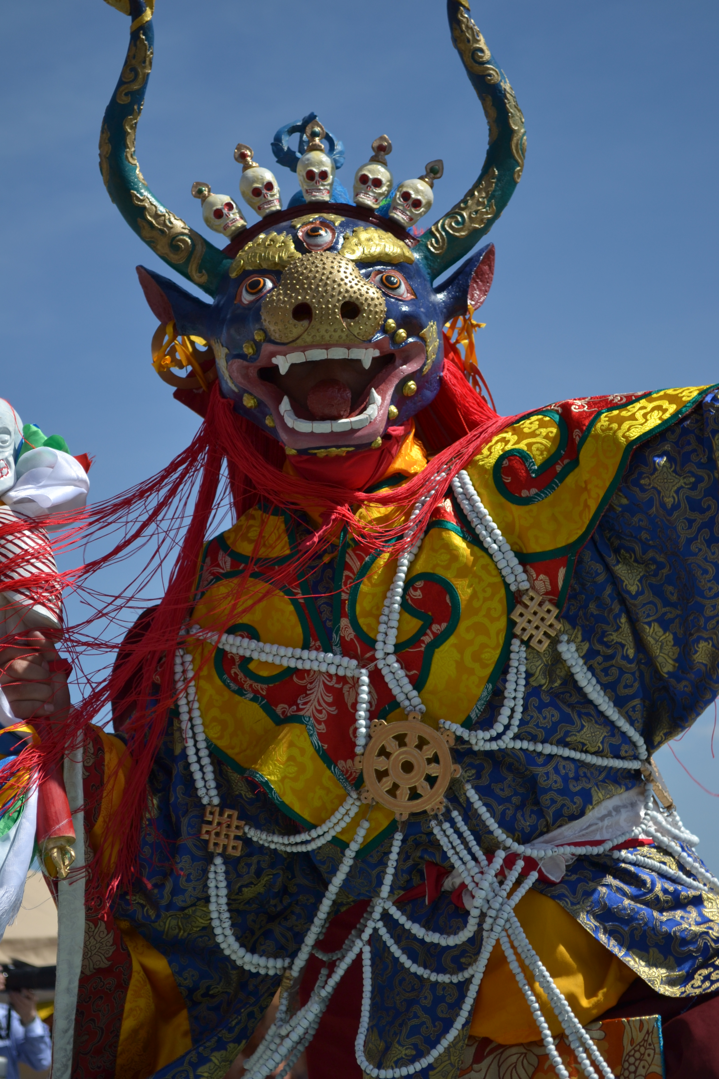 Цам - одна из основных буддистских религиозных мистерий. Бурятия, дацан на Верхней Березовке в Улан-Удэ